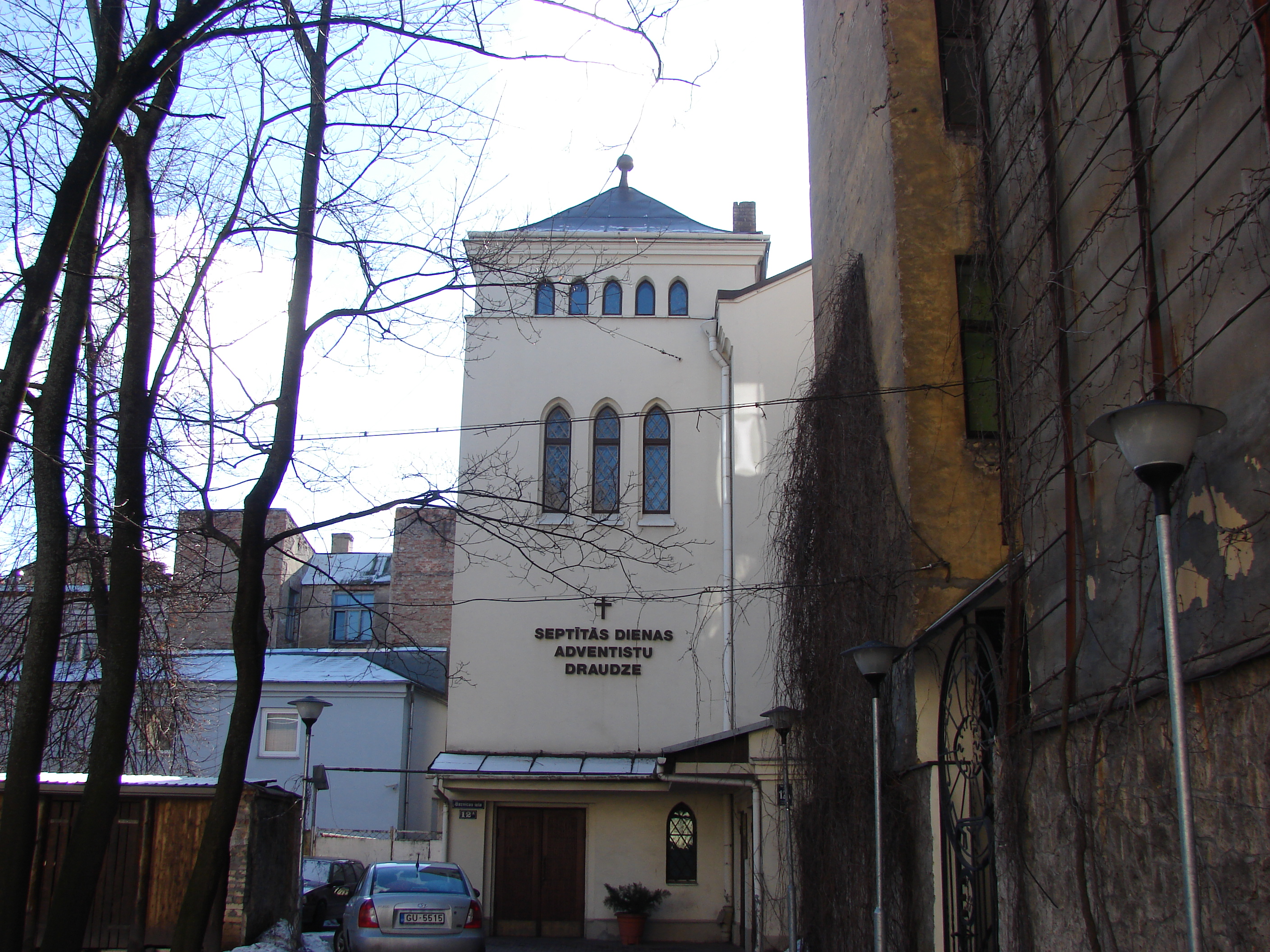 Septītās dienas adventistu Latvijas draudžu Savienība, Baznīcas iela 12a, Rīga, Latvia.